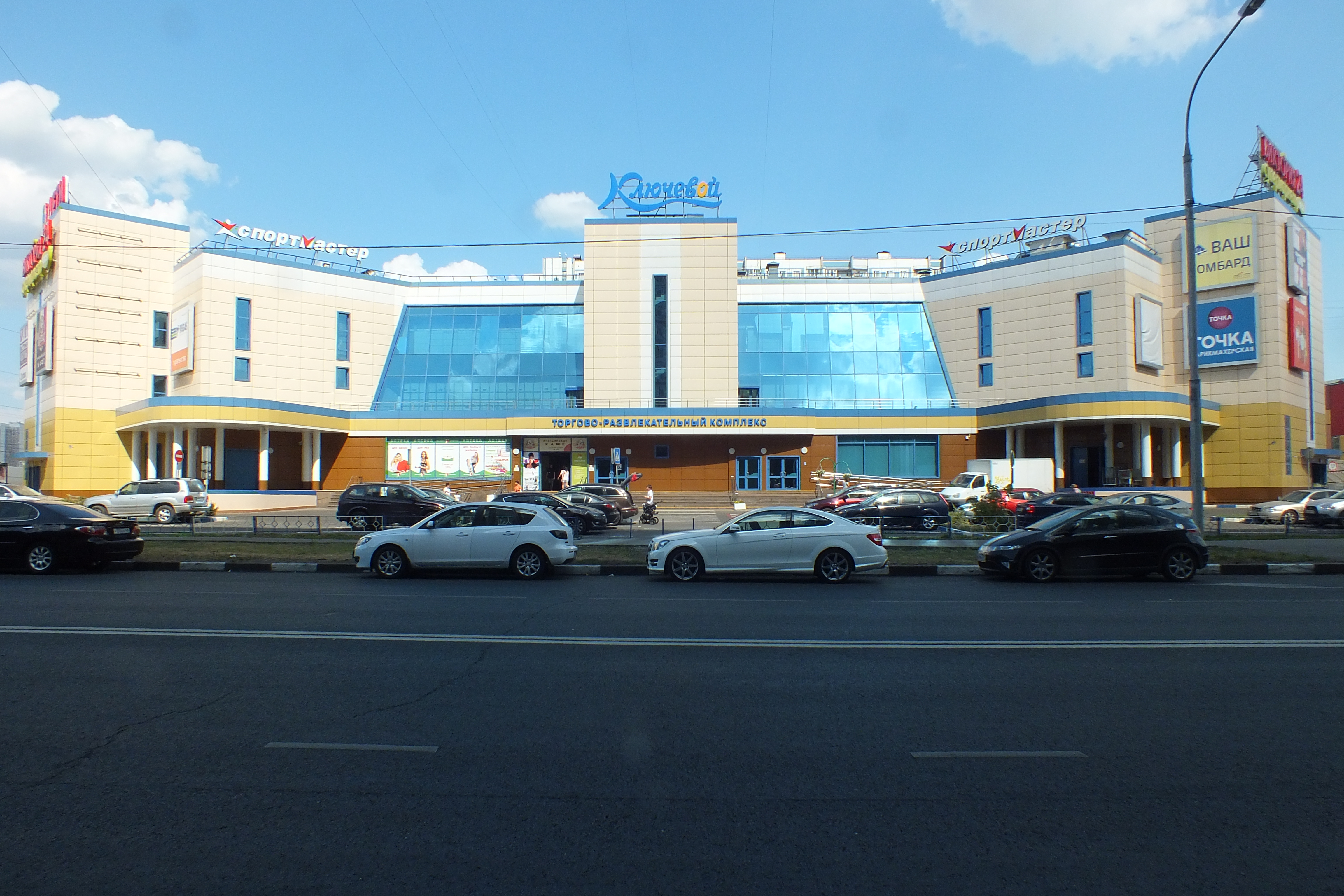 Торгово-развлекательный центр «Ключевой» в районе Братеево, открывшийся в 2009 году